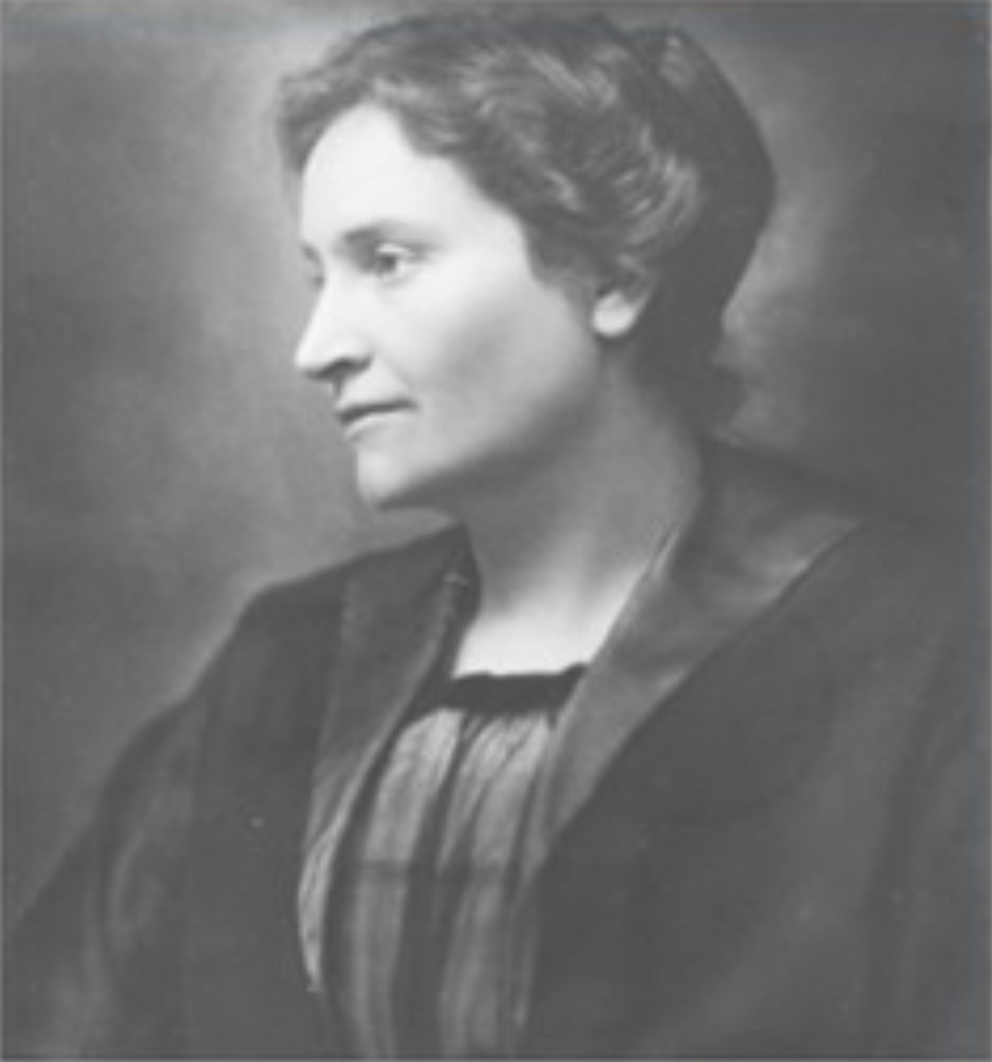 Bildnis der liberaldemokratischen Politikerin Jenny Apolant